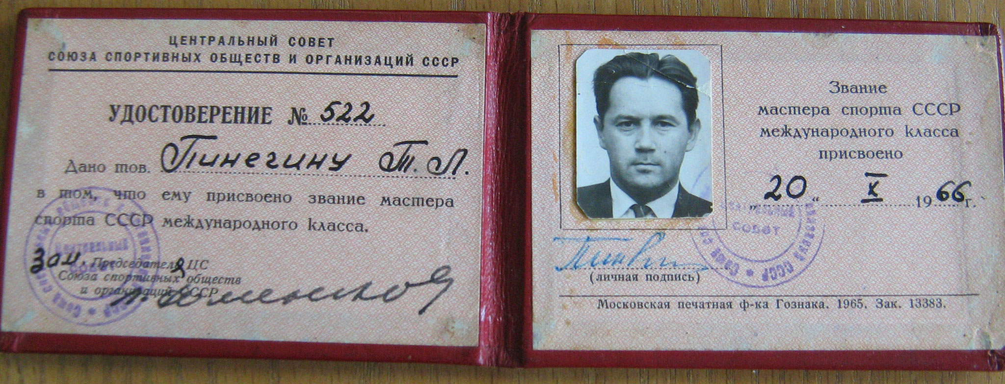 Удостоверение мастера спорта СССР международного класса Пинегина Тимира Алексеевича.